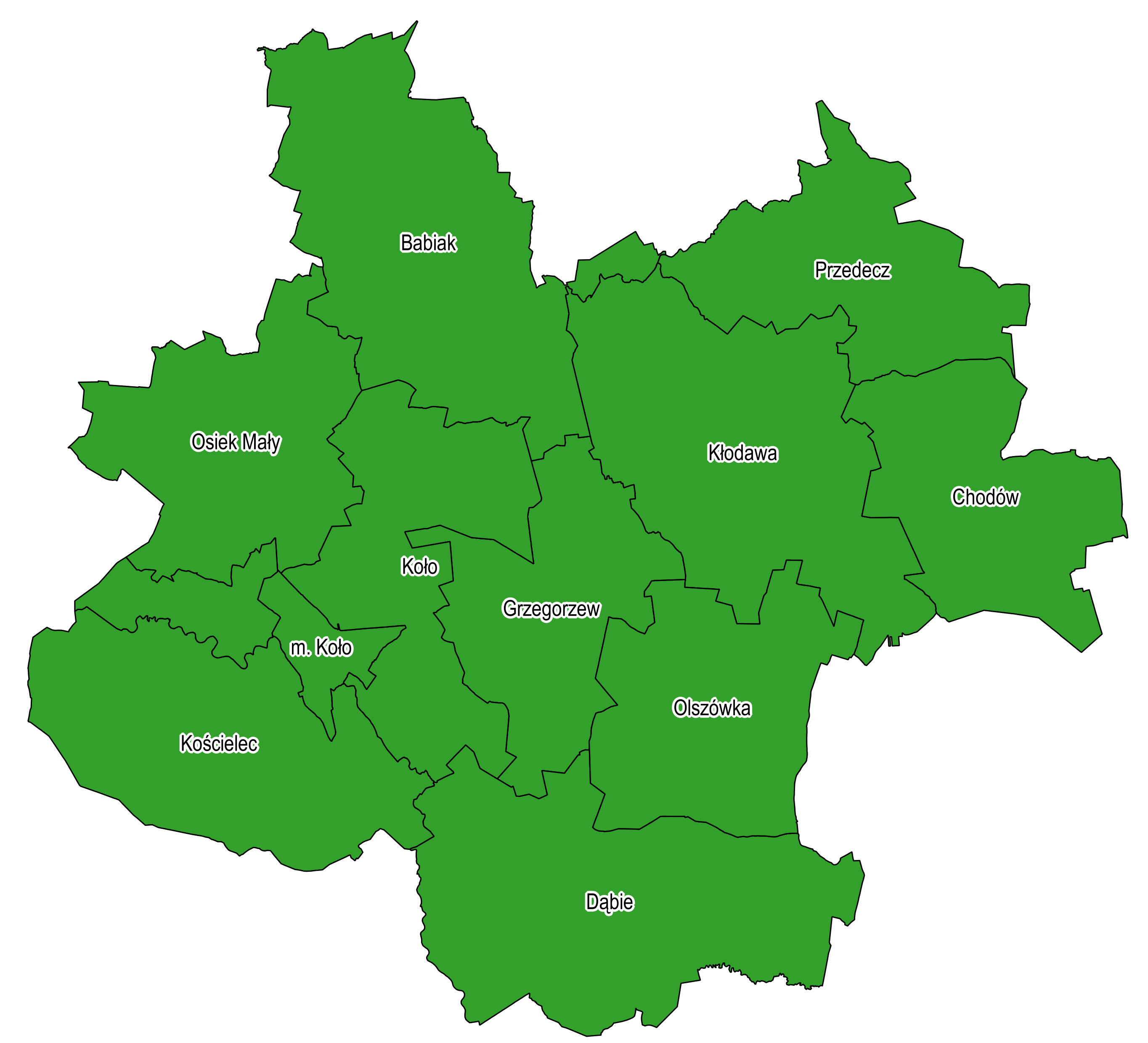 powiat kolski z podziałem na gminy